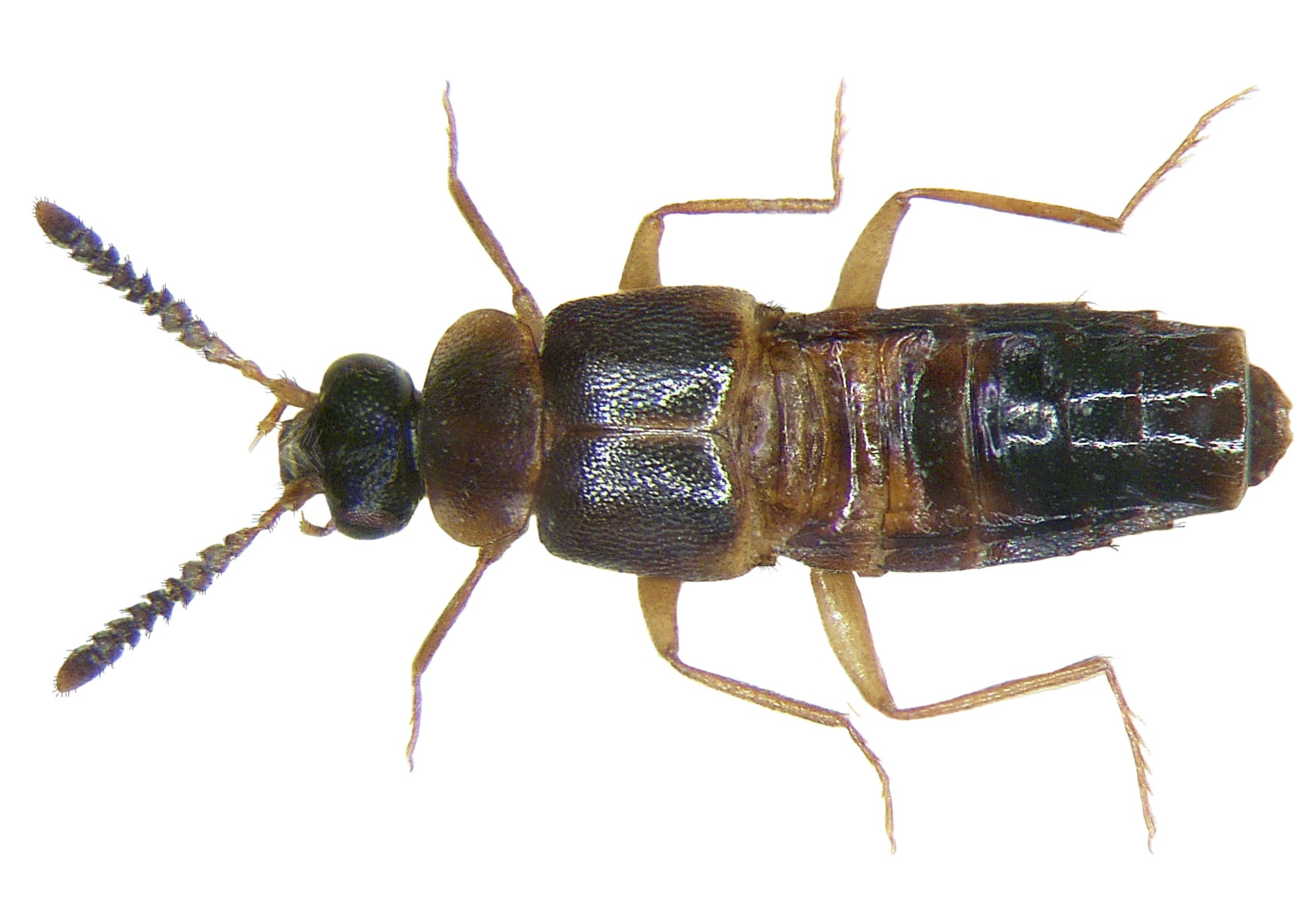 Familie: Staphylinidae Grösse: 4,5 mm Fundort: Kenia, Mombasa, Diani-Beach leg. U.Schmidt, 1990; det. R.Pace, 2007 Paratypus Foto: U.Schmidt, 2008